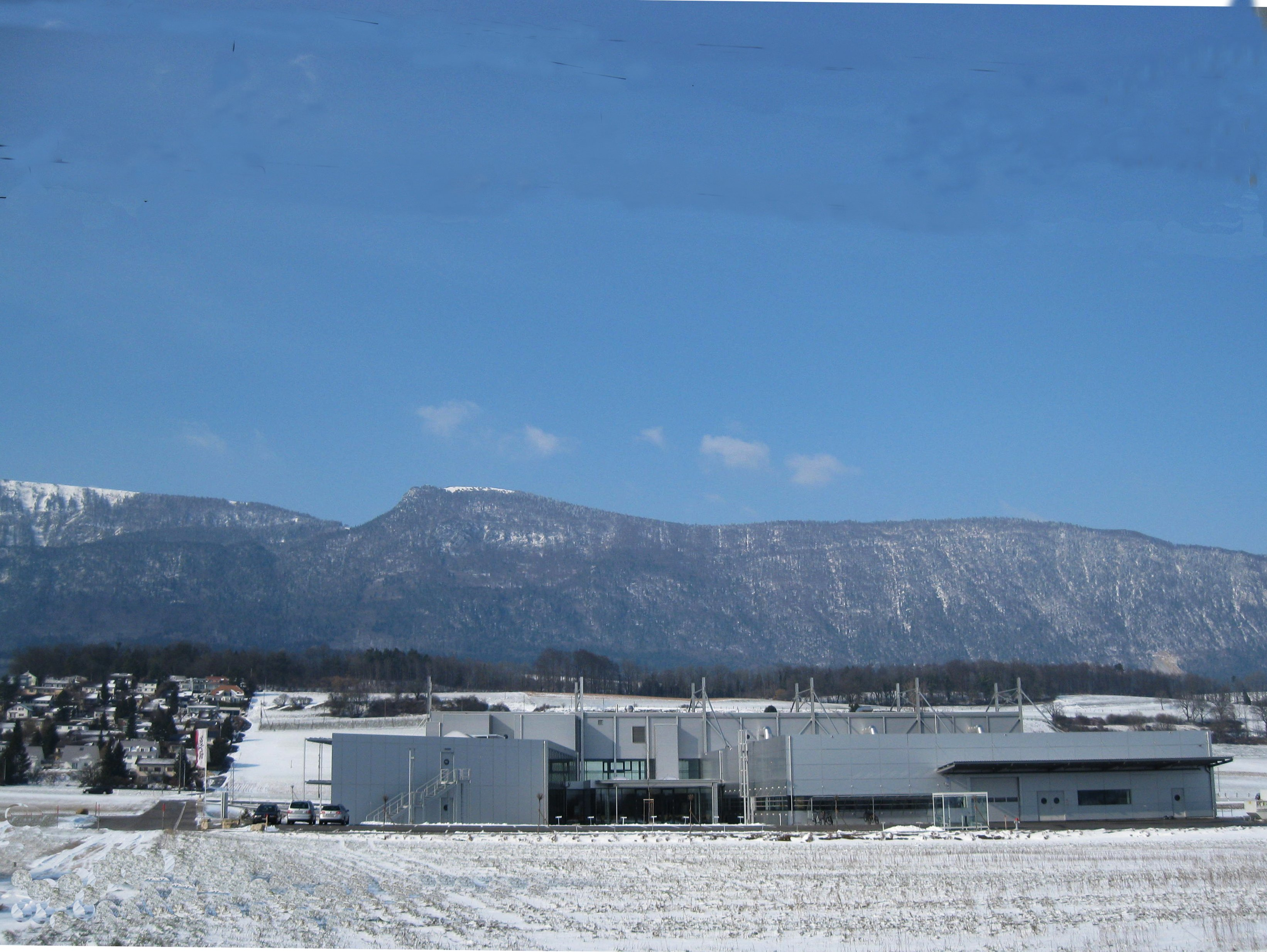 selzach ost mit hasenmatt jura